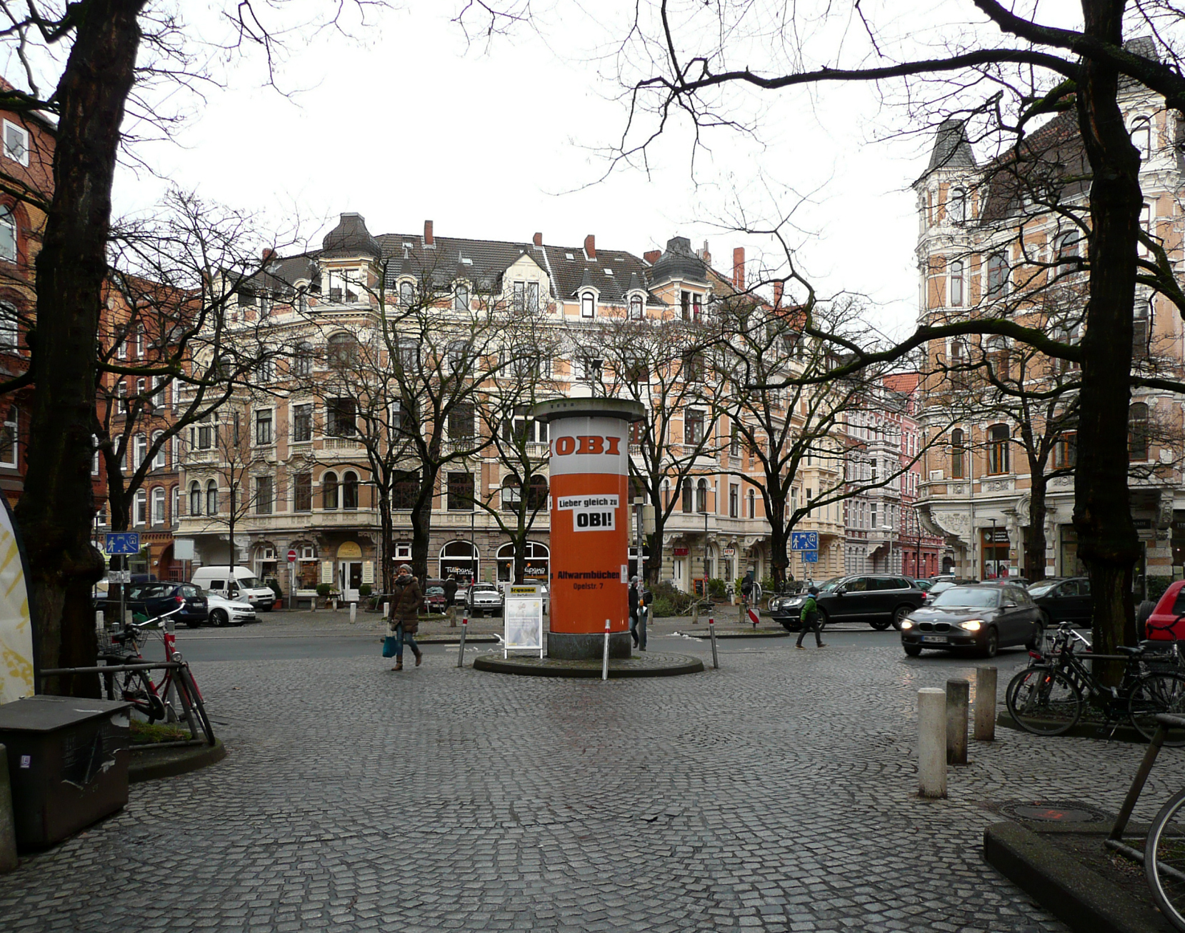 Wedekindplatz in Hannover mit Spruchband gegen Baumfällungen